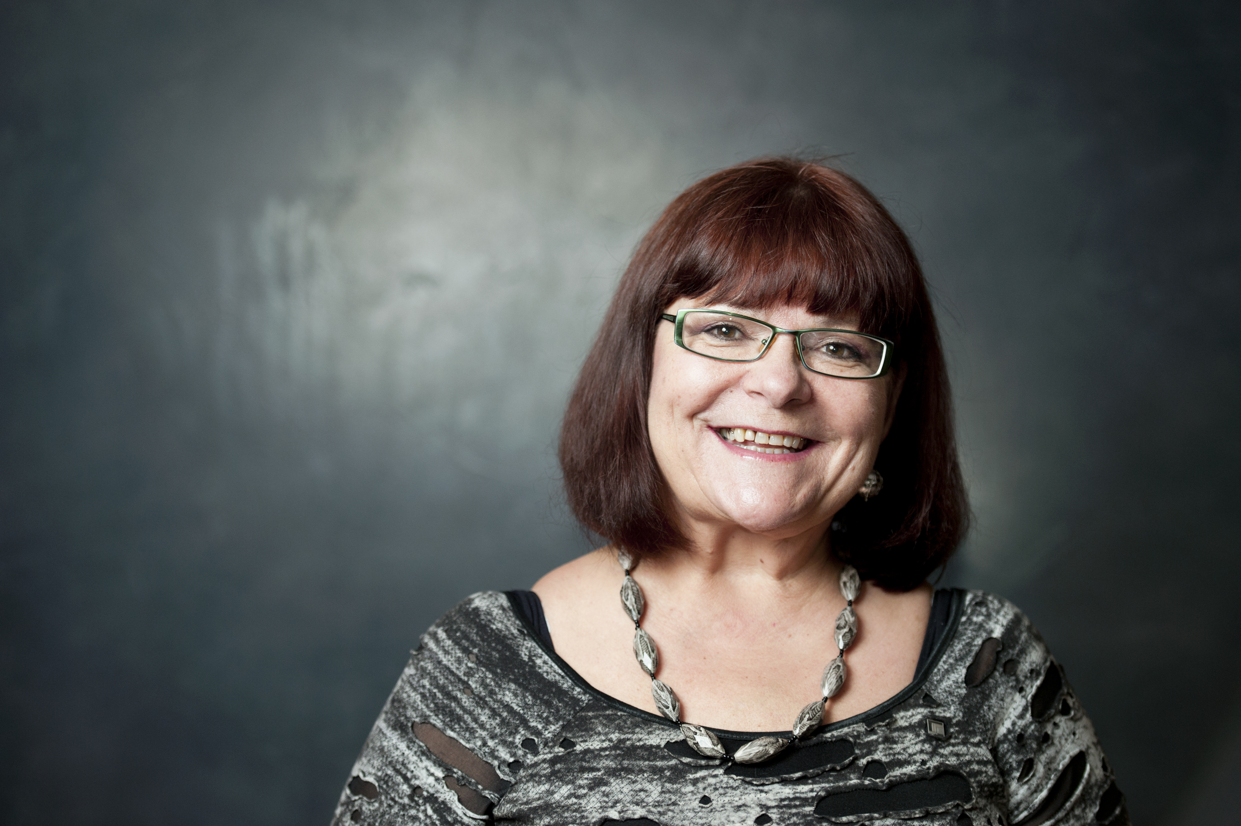 Maria Tolppanen, Sannfinländarna Finland.